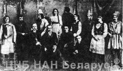 Беларускі музычна-драматычны гурток у Вільні. Спектакль „Залёты”.